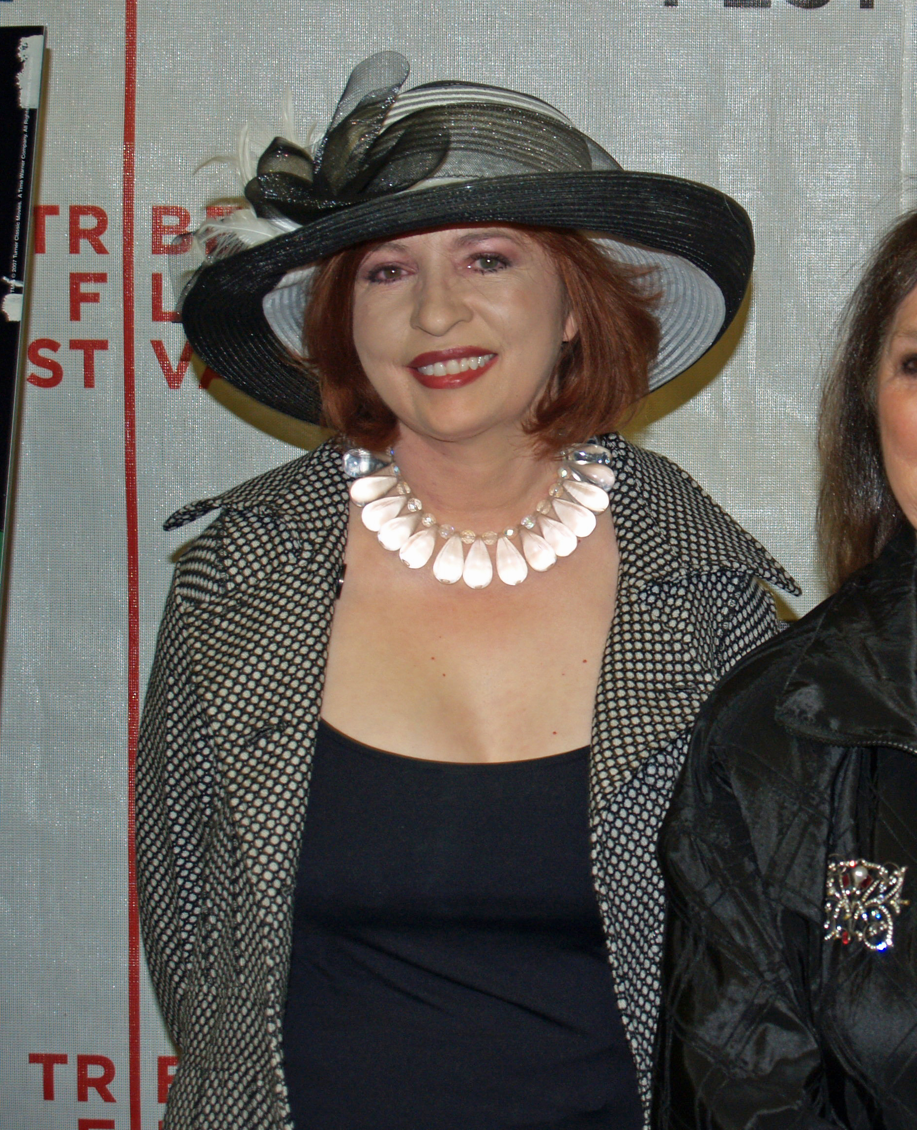 Patt Morrison